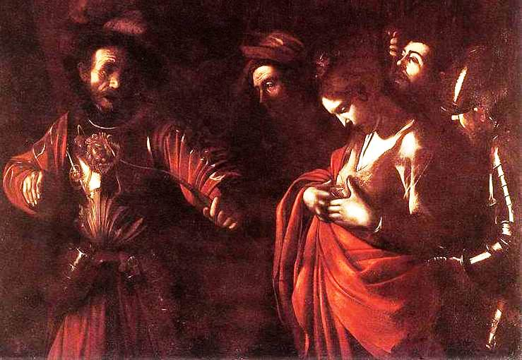 detail